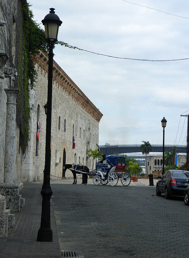 Fassade der Casas Reales in Santo Domingo, Republica Dominicana